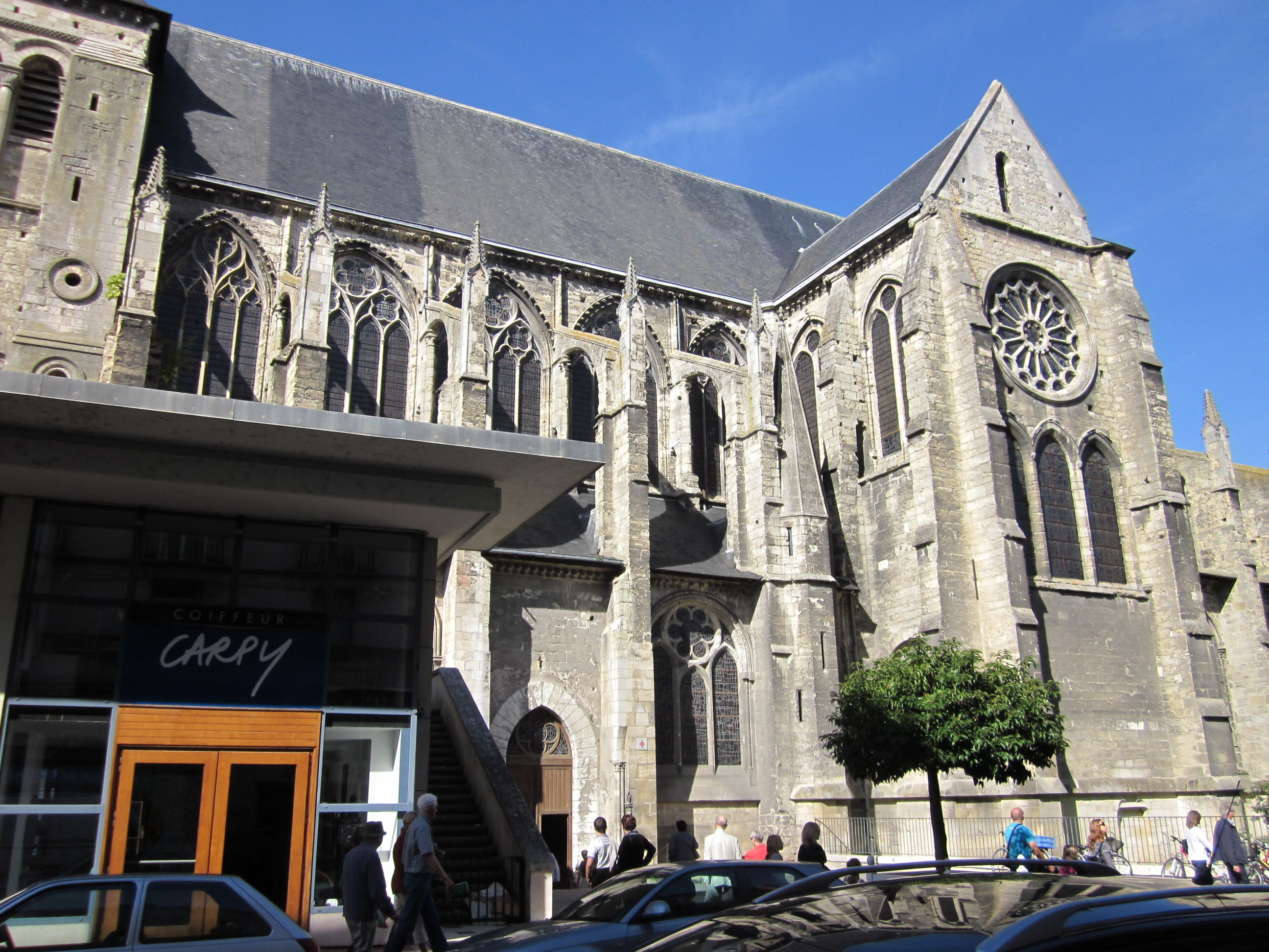 Façade sud de l'église Saint-Julien de Tours (Indre-et-Loire, France), sur la rue Colbert.